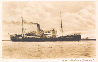 Der brasilianische Passagierdampfer Almirante Jaceguay ex-Professor Woermann